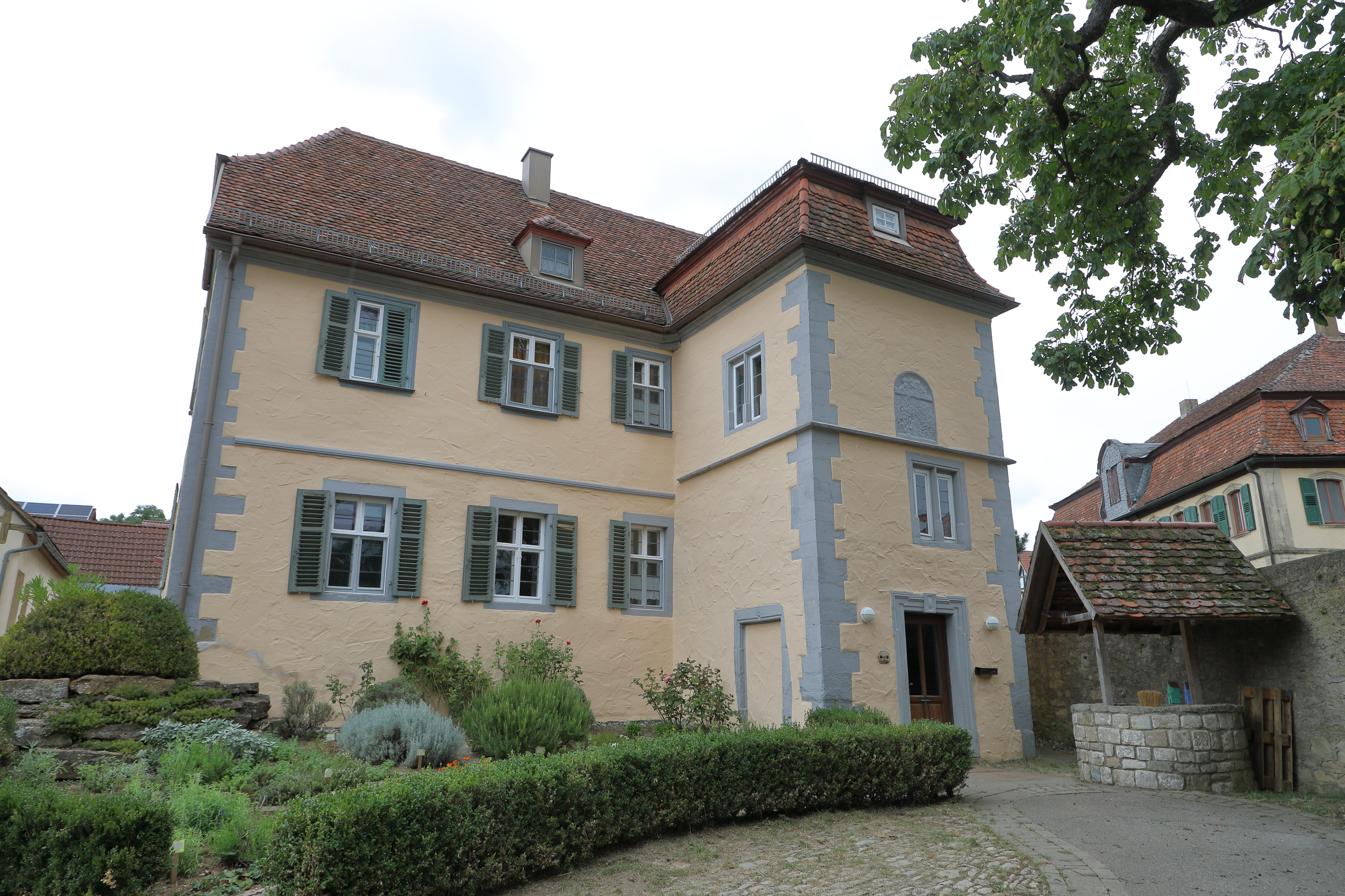 Der "Schulbauernhof Pfitzingen" ist eine Bildungseinrichtung des Landes Baden-Württemberg. Er ist u.a. in den denkmalgeschützten Gebäuden Pfitzingen 14 und Pfitzingen 41, dem "Schlösschen Pfitzingen" untergebracht.